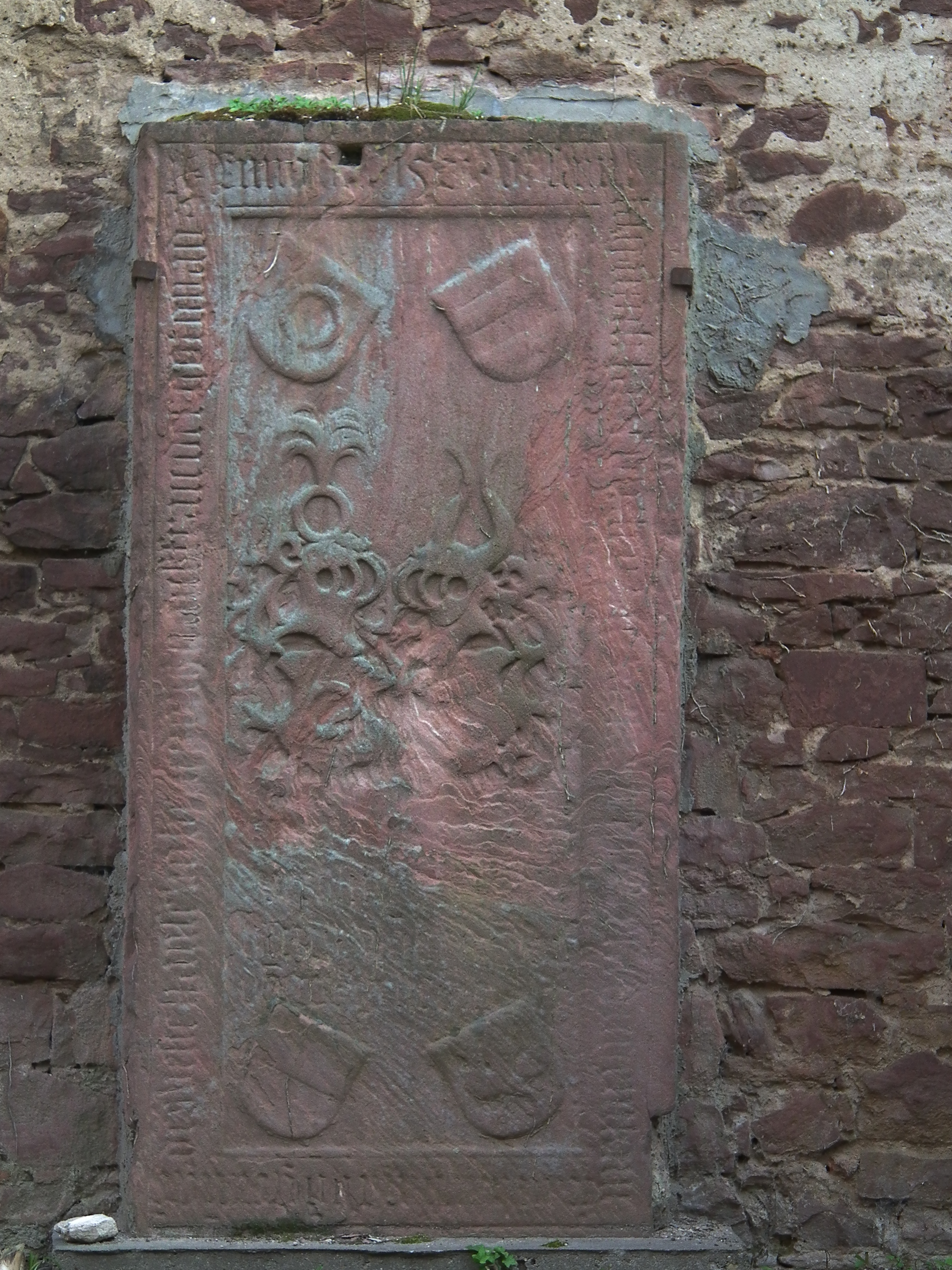 Grabplatte vor einer Backsteinmauer an der katholischen Kirche St. Laurentius in Nußloch (Baden-Württemberg, Deutschland): Barbara von Gemmingen, gest. 1521, Frau von Hans von Bettendorff, Allianzwappen